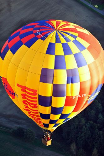 Ein Heißluftballon am Himmel über Cottbus, Brandenburg. Er ist von der Marke Lindstrand Balloons mit der Kennung D-OLTB.